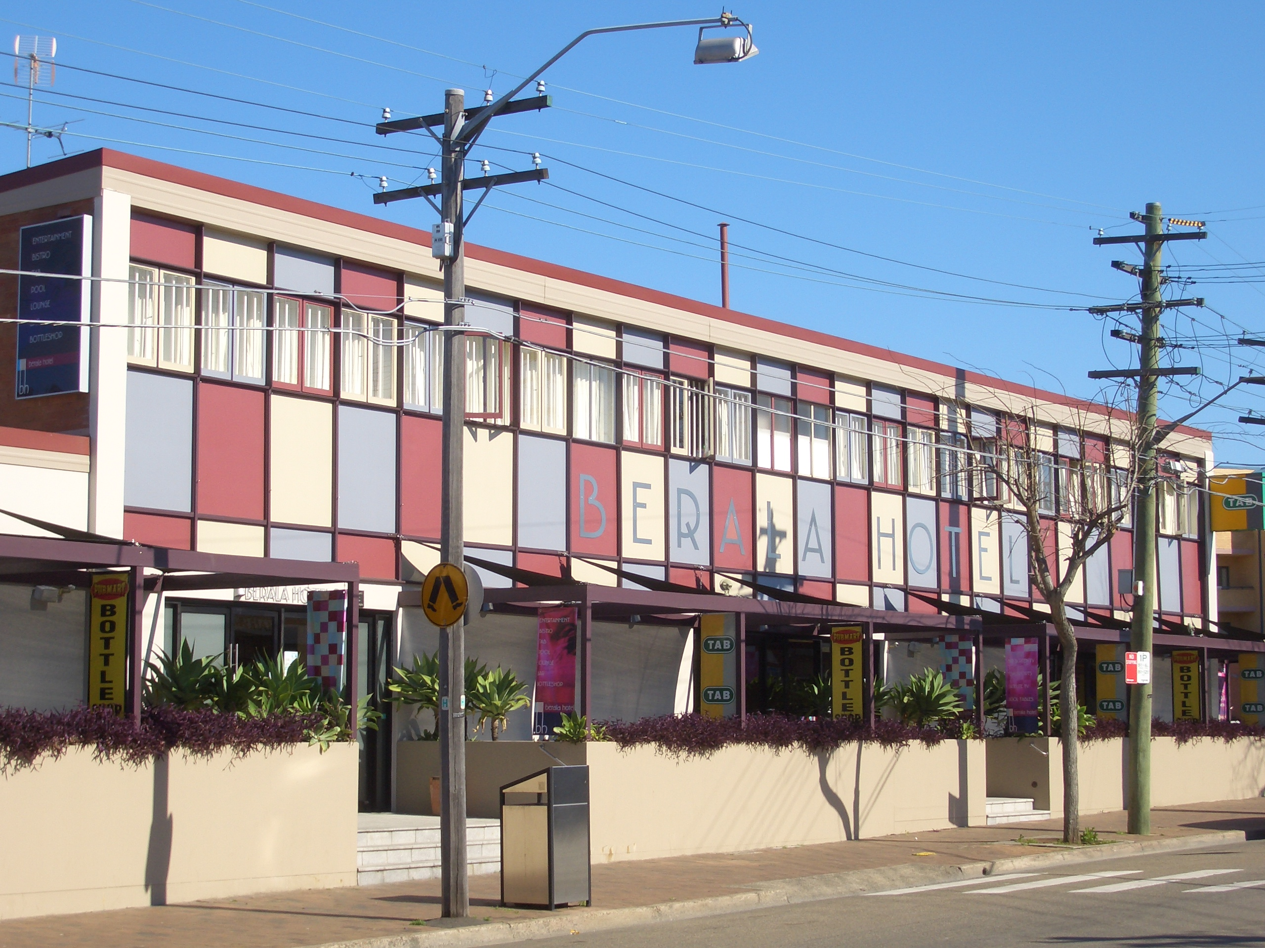 Berala Hotel, Sydney